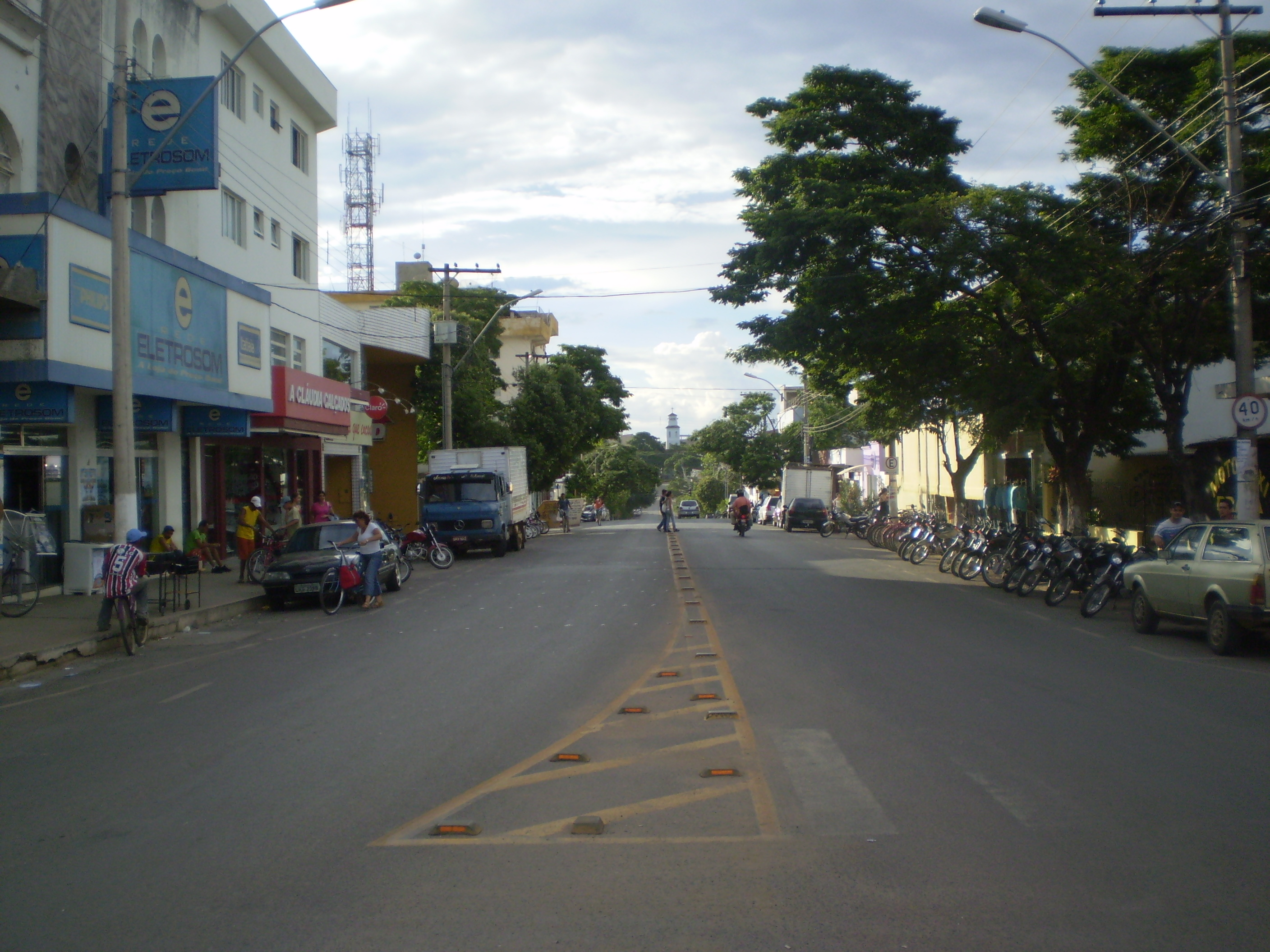 Lagoa da Prata, A rua principal